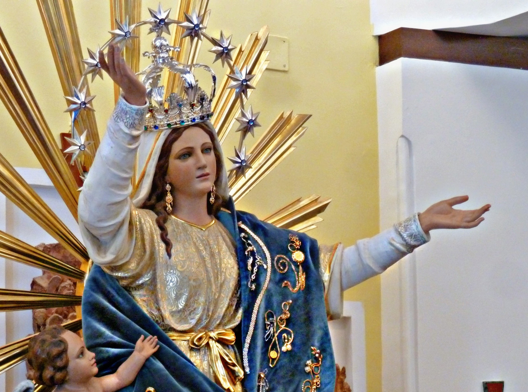 Foto di Santa Maria Assunta, Nizza.